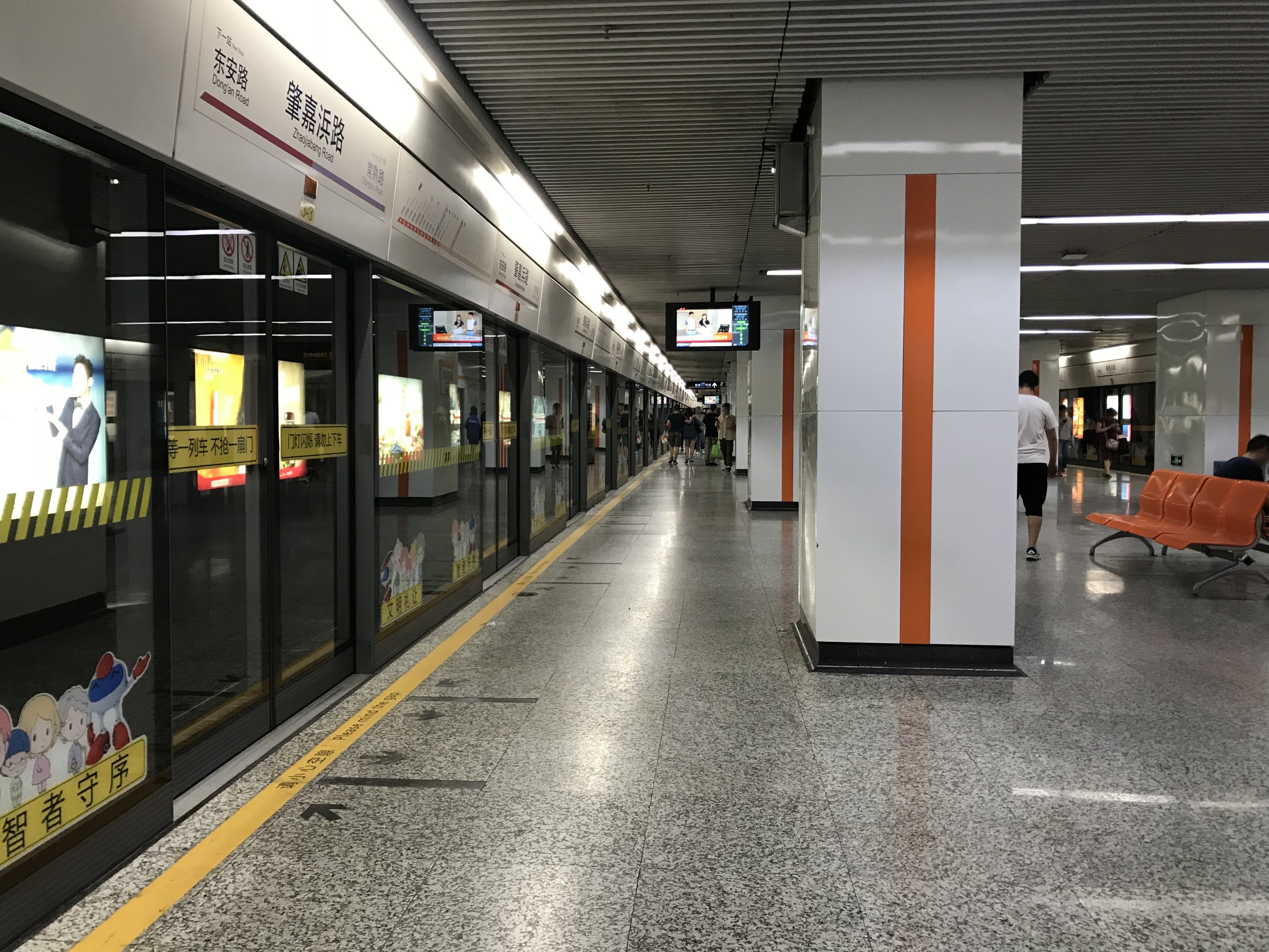 肇嘉浜路駅(上海地下鉄7号線)のホーム